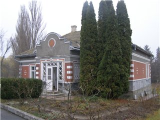 Будинок "Музею Плакату" у національному музеї народної архітектури та побуту України "Пирогів"